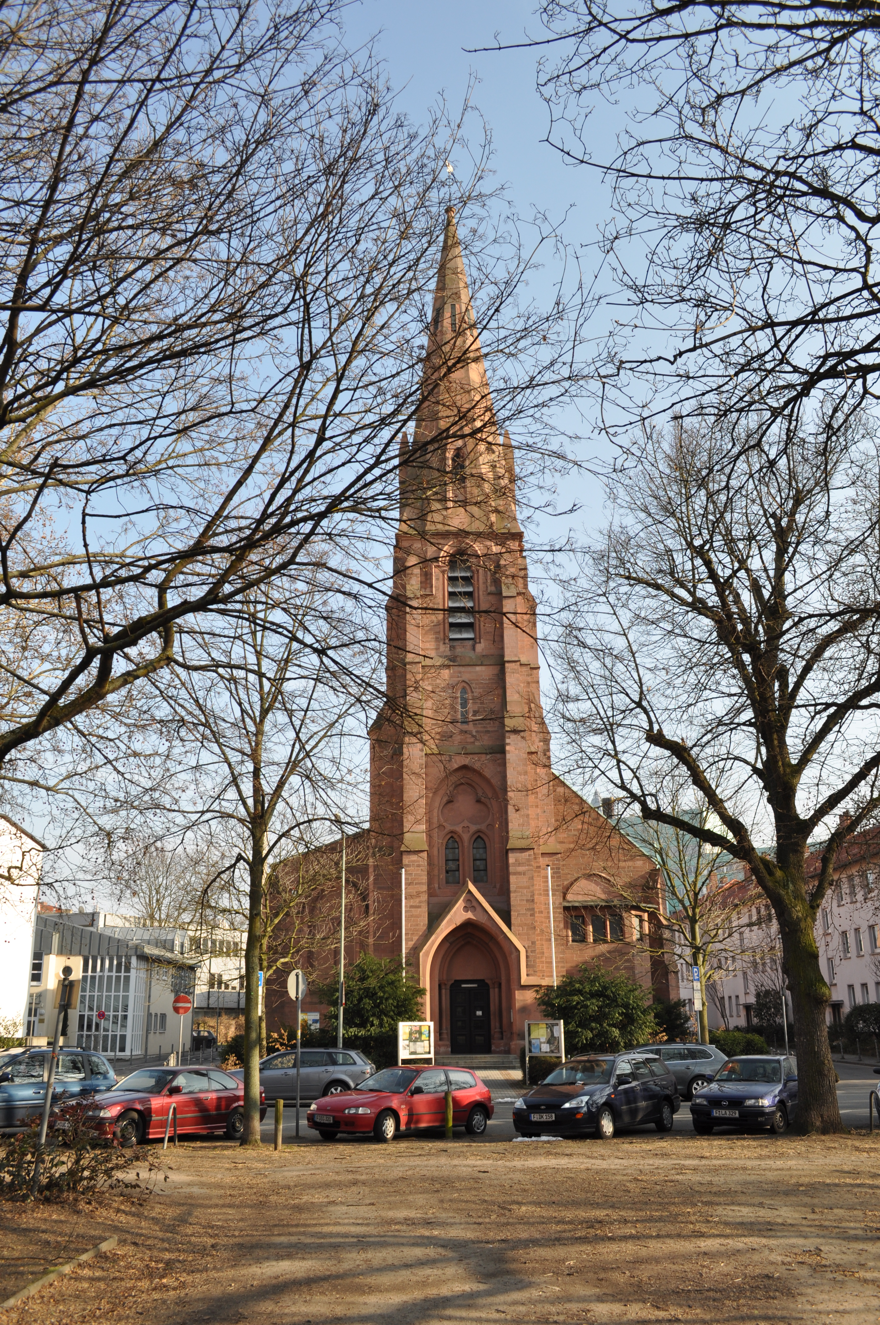 St. Elisabeth-Kirche in Frankfurt Bockenheim)